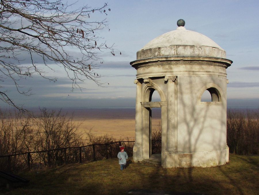 A fertőbozi Gloriette-kilátó (Győr-Moson-Sopron megye)